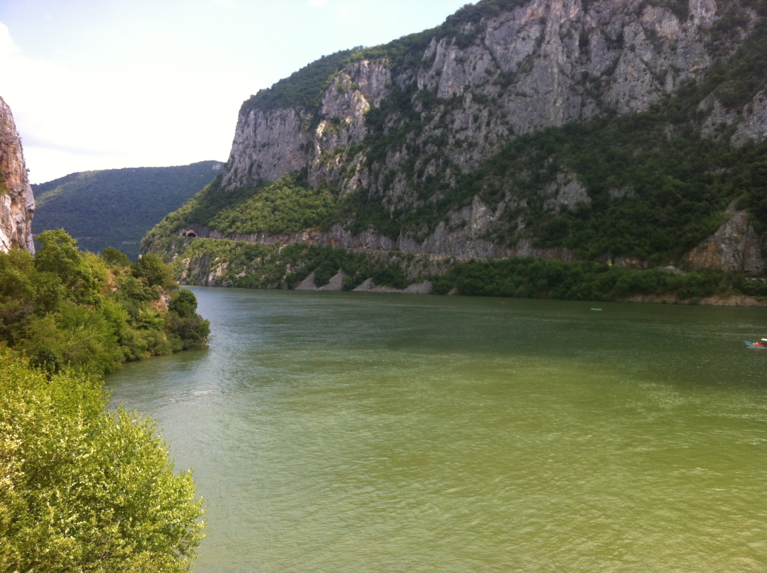 Dubova, Romania